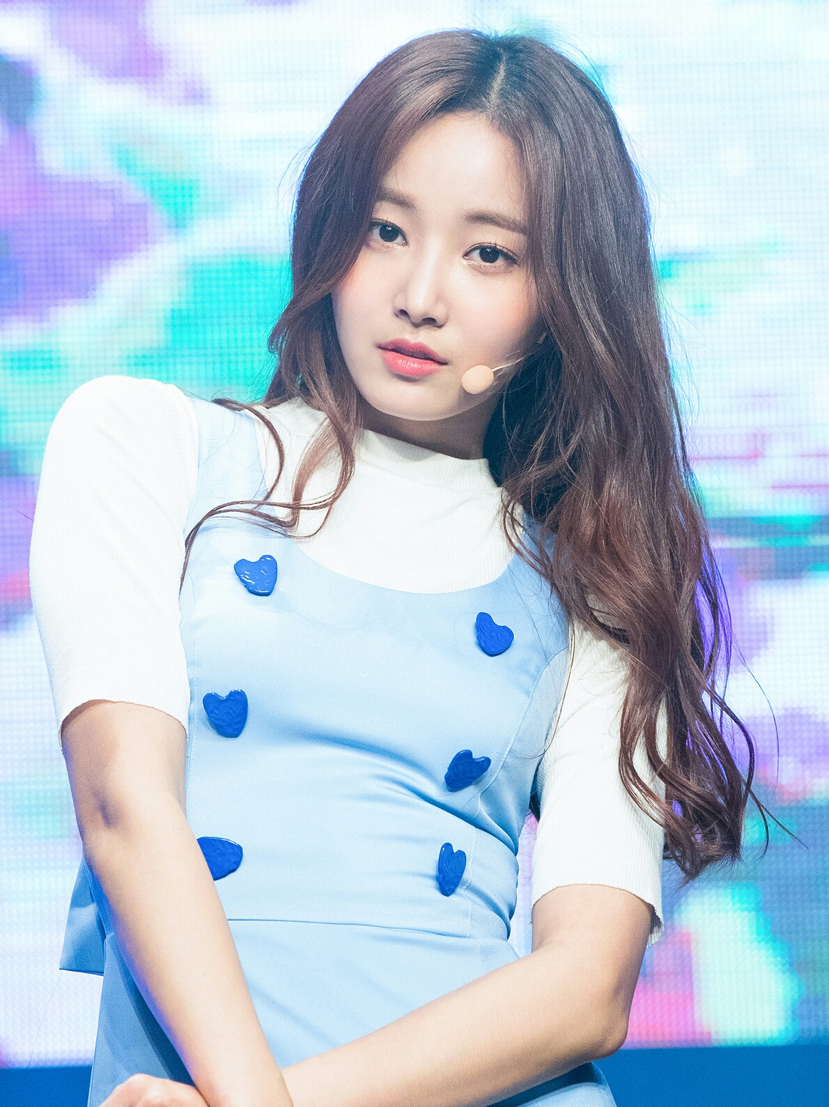 Yeonwoo no The 25th Korea Culture & Entertainment Awards em 28 de novembro de 2017